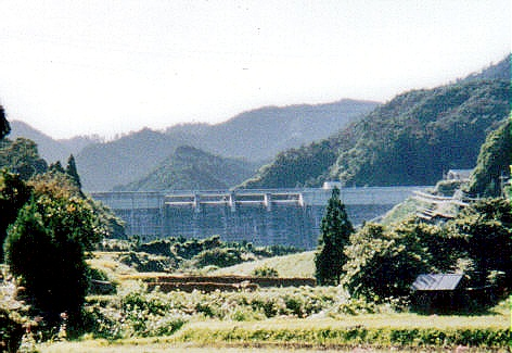 Dam